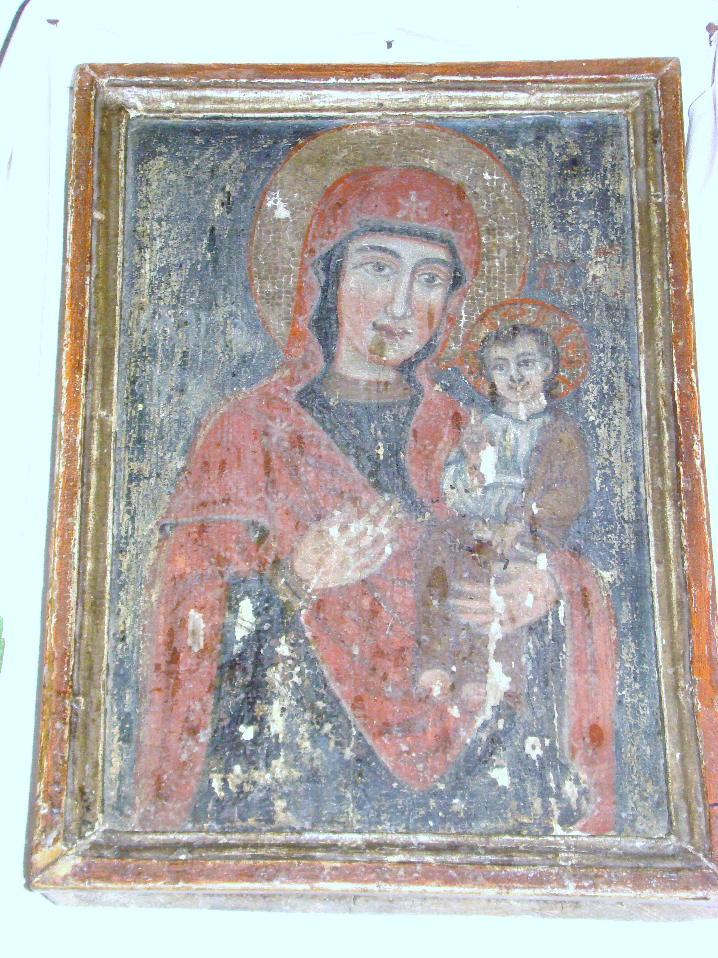 Biserica de lemn "Sfinții Arhangheli Mihail şi Gavril", sat PLOPIŞ; comuna ŞIŞEŞTI